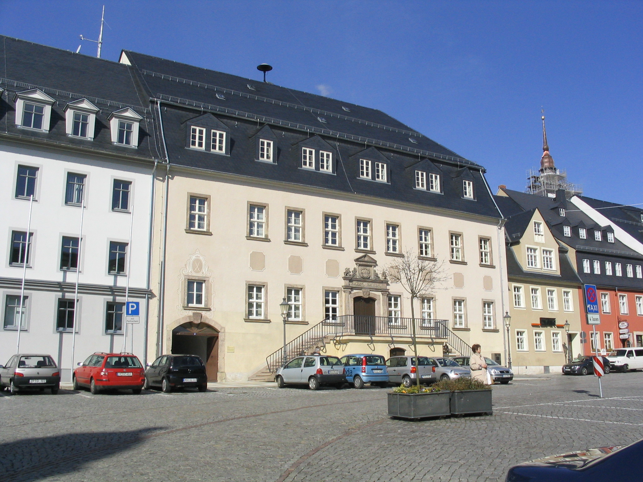 Neues Rathaus, aufgenommen am 15.04.2006 von Dr. Hagen Graebner